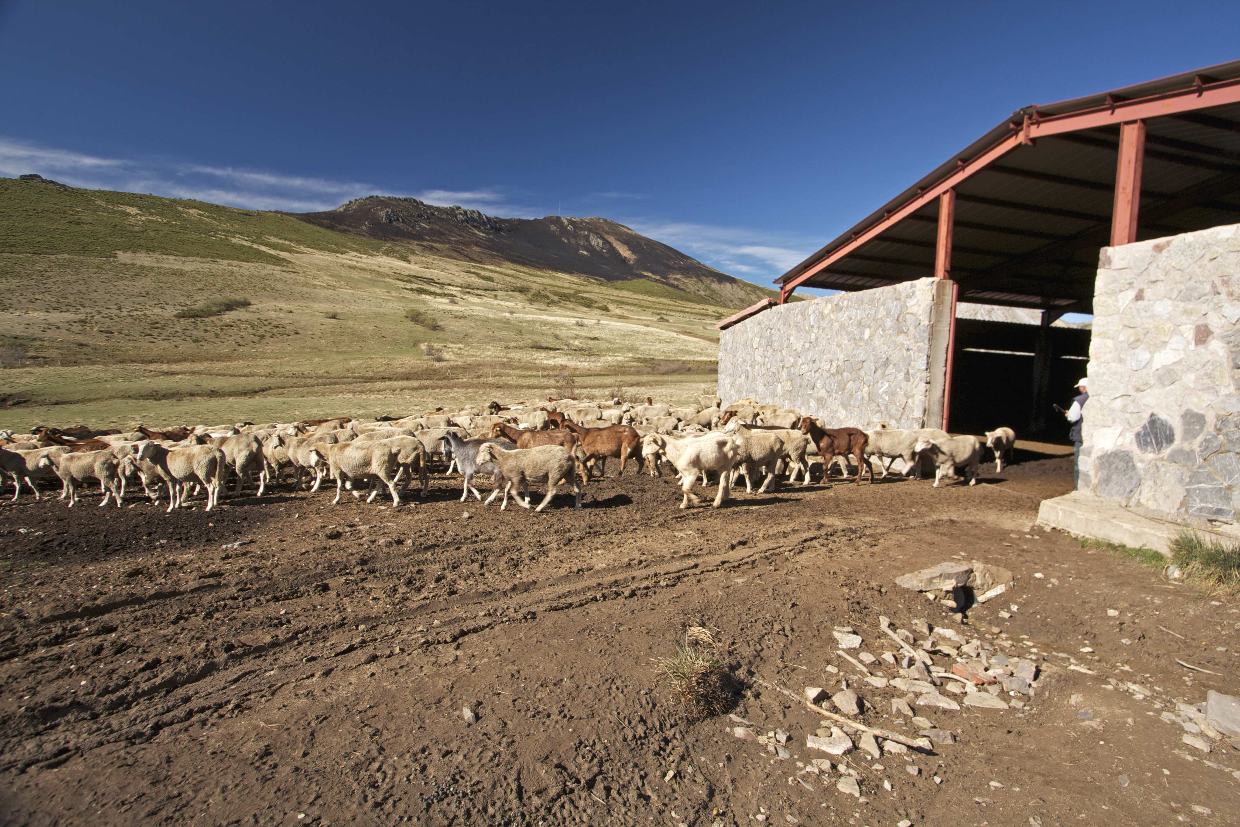 Vecera comunal en Salce, León